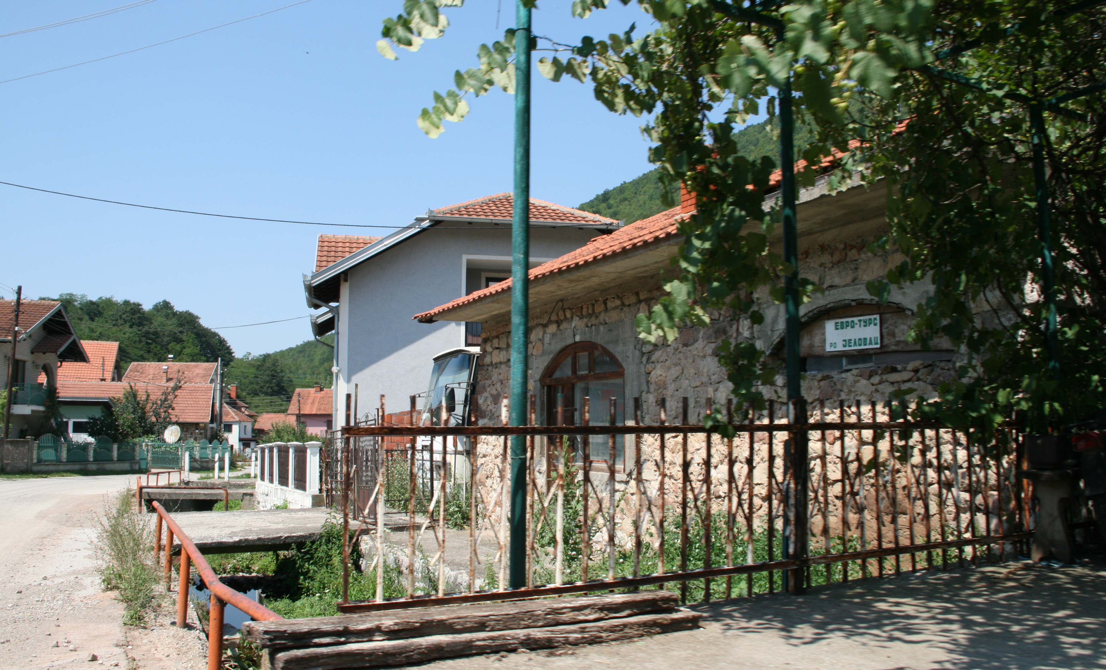 Евро Турс у Јеловцу, предузеће за градски и приградски копнени превоз путника